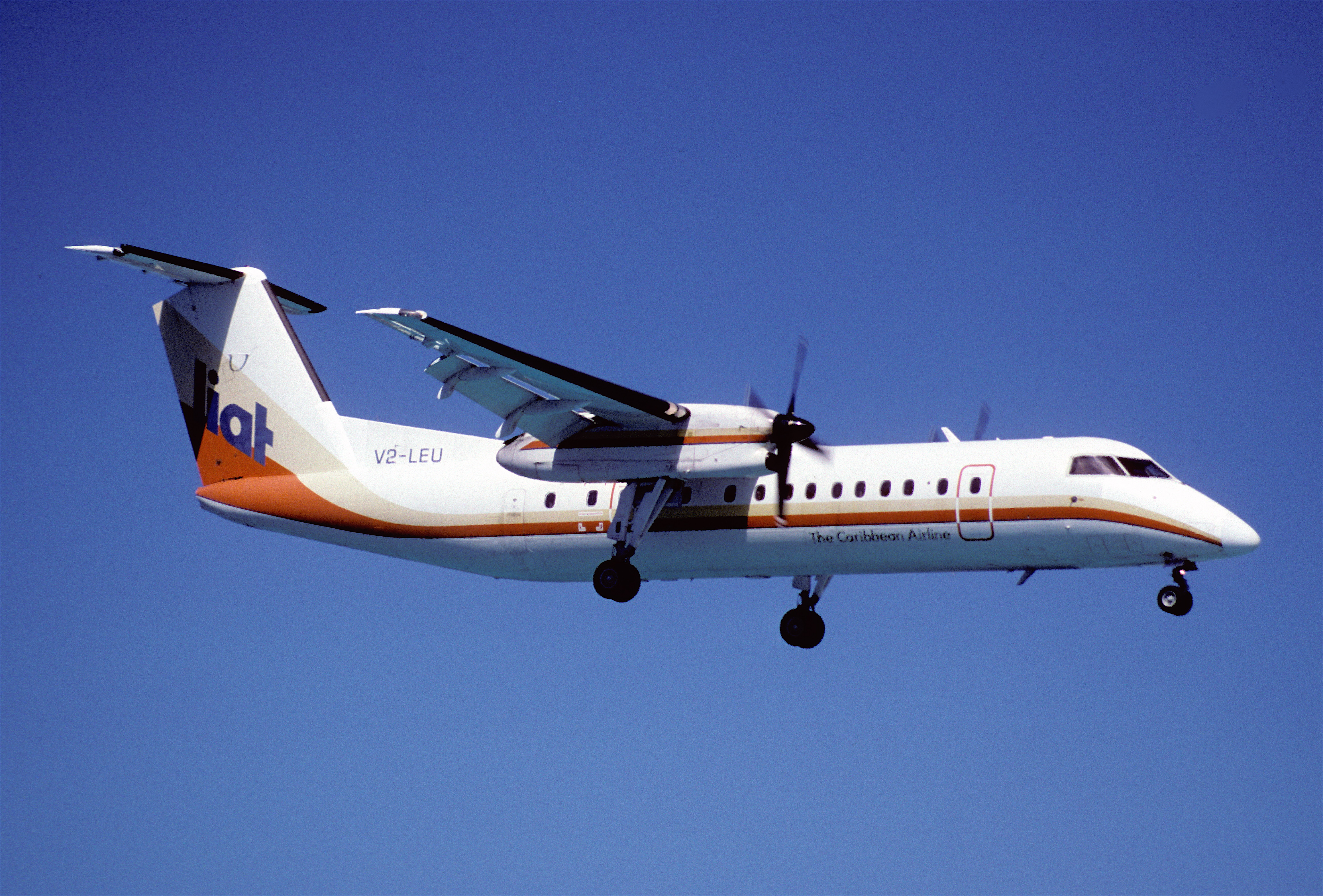 50ak - LIAT DHC-8-311 Dash 8; V2-LEU@SXM;05.02.1999